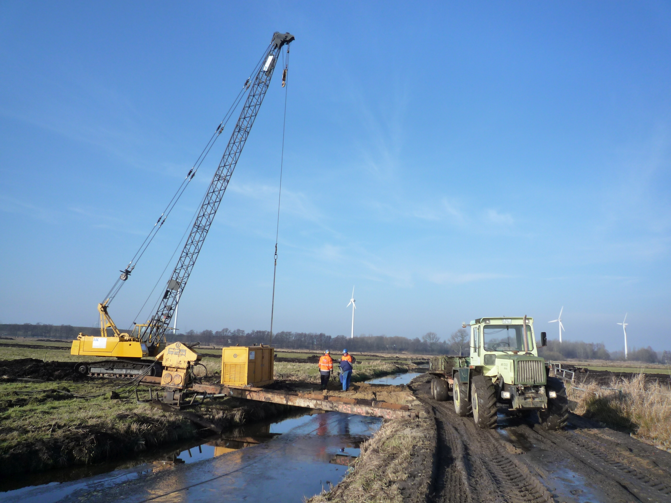 Einbau von Stauwehren zur Wasserrückhaltung im Feuchtgrundland an den Zuläufen zur Fünfhausener Landweg Wettern